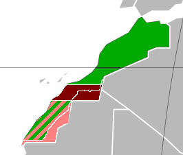 Сагиет-Эль-Хамра (расположение)